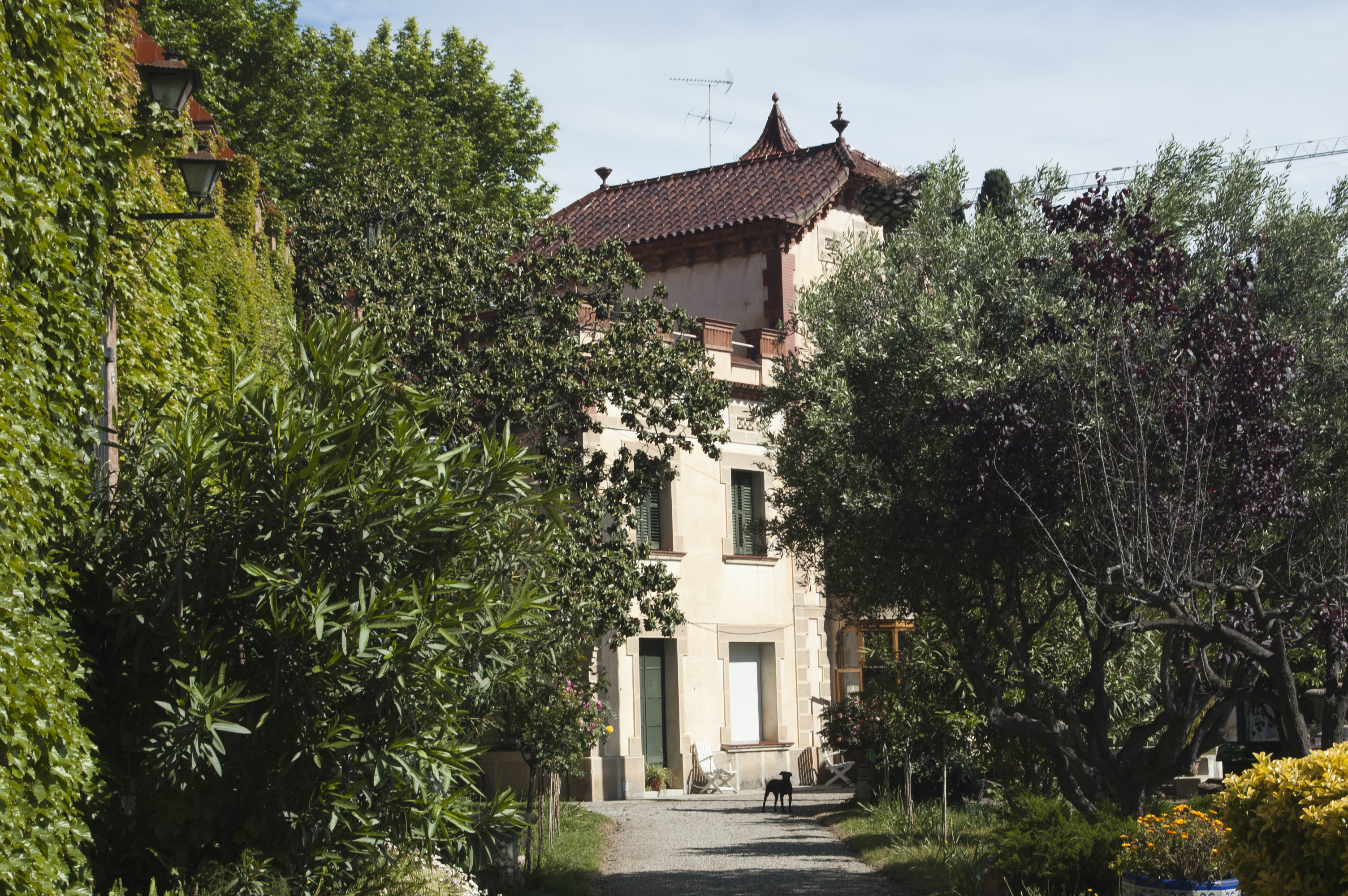 Villa Carlota, o Ca l'Arnú. Obra popular del segle XX del municipi de Tiana